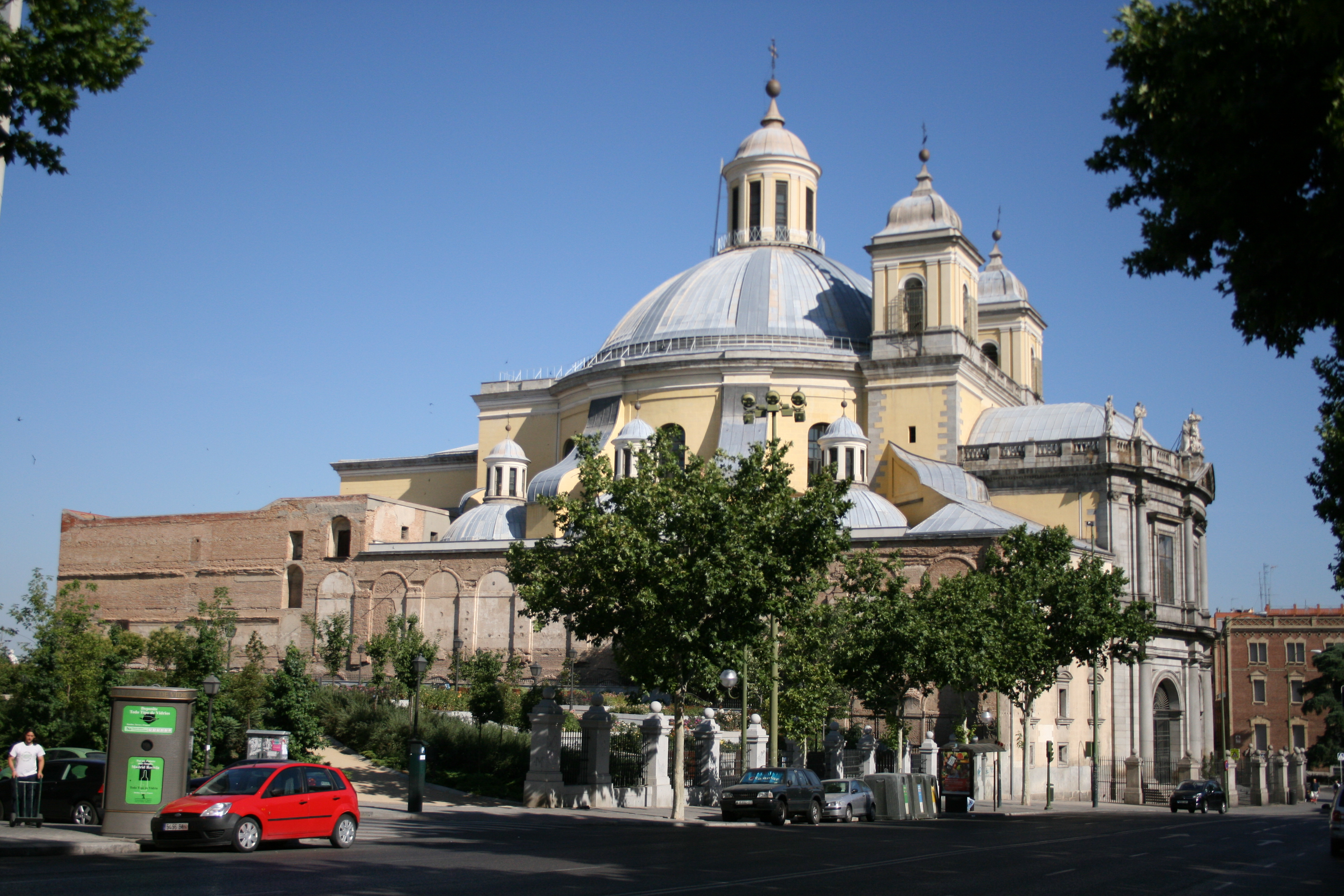 Basílica de San Francisco el Grande, Madrid - vista desde la calle Bailén